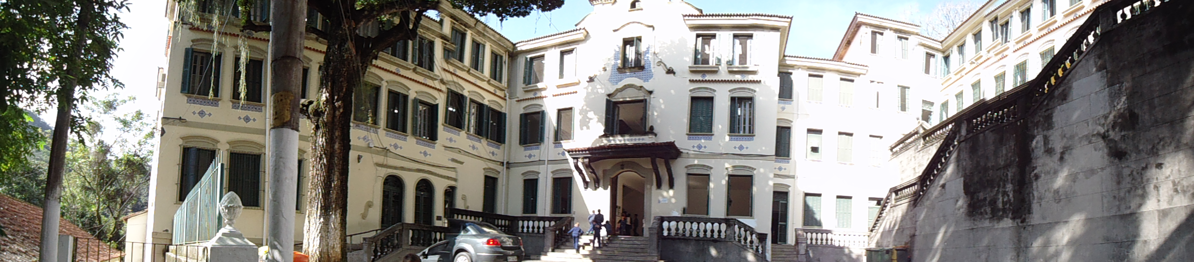 Fundação Osório, Rio Comprido, Rio de Janeiro, RJ, Brasil: Pavilhão do ensino fundamental.